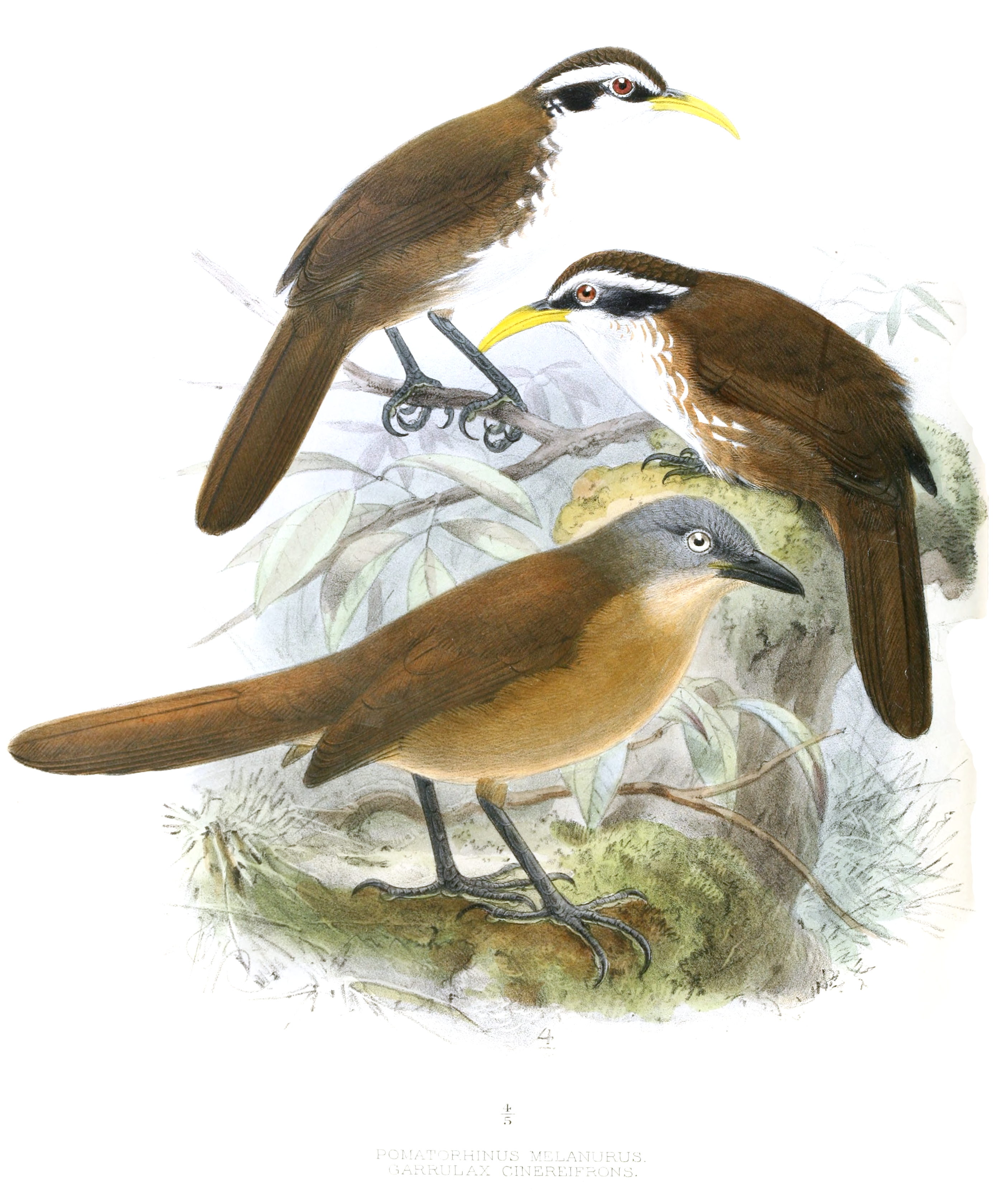 Original description Pomatorhinus melanurus Garrulax cinereifrons